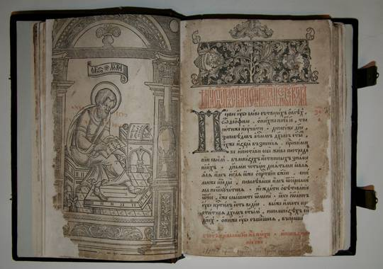 Апостол. Львов, 1574 г.